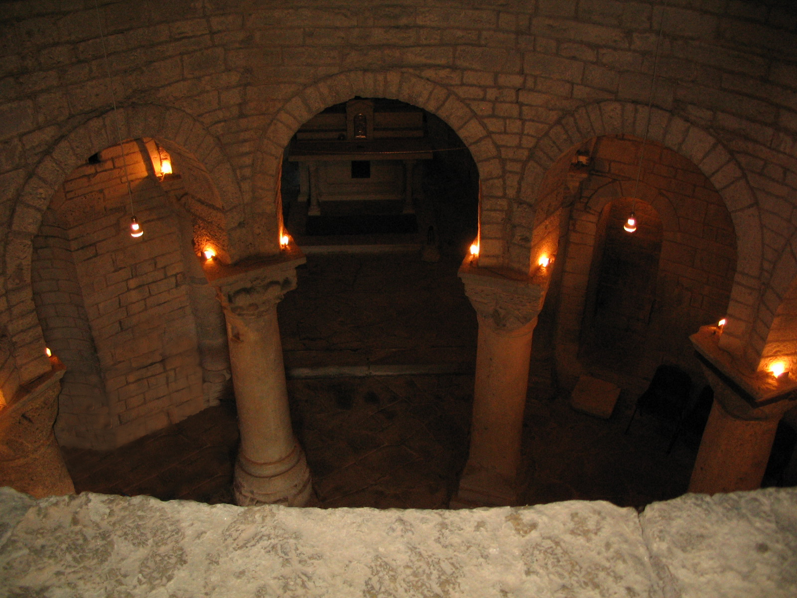 Autore Giorces. San Tomè, dal matroneo al buio.